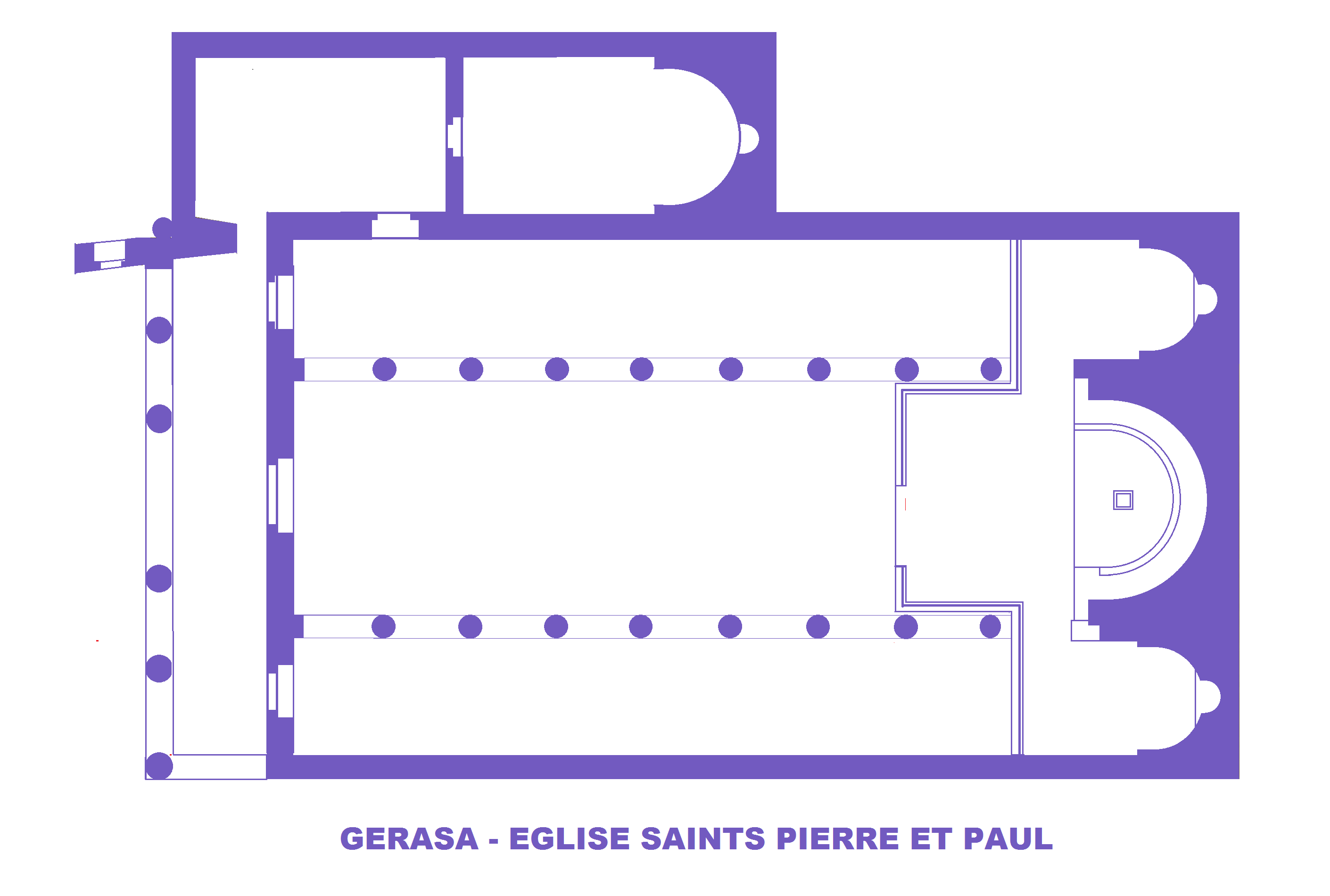 Gerasa, église Saints Pierre et Paul